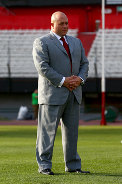 Antonio Caselli en 2013